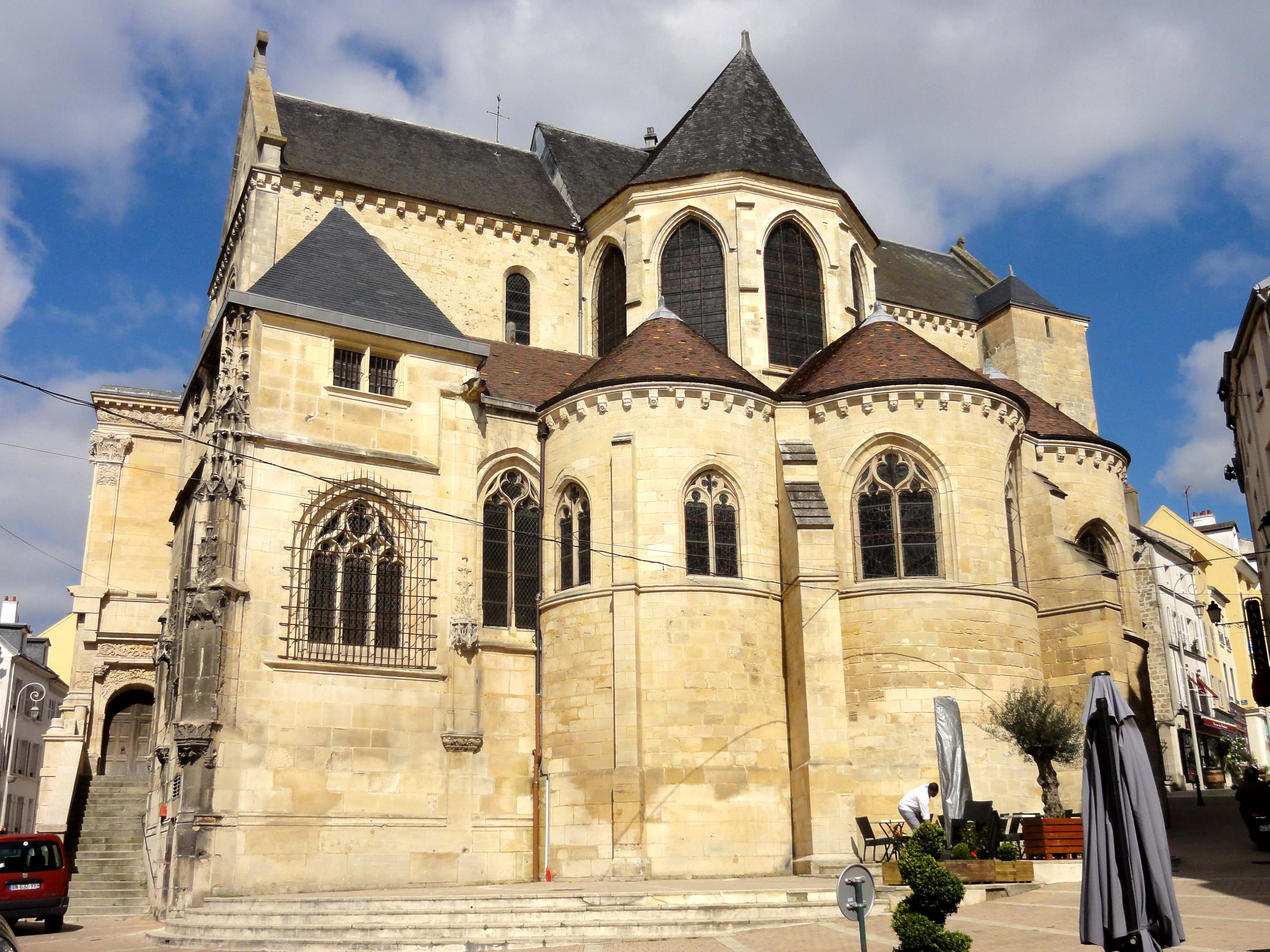 Cathédrale Saint-Maclou de Pontoise - voir titre.